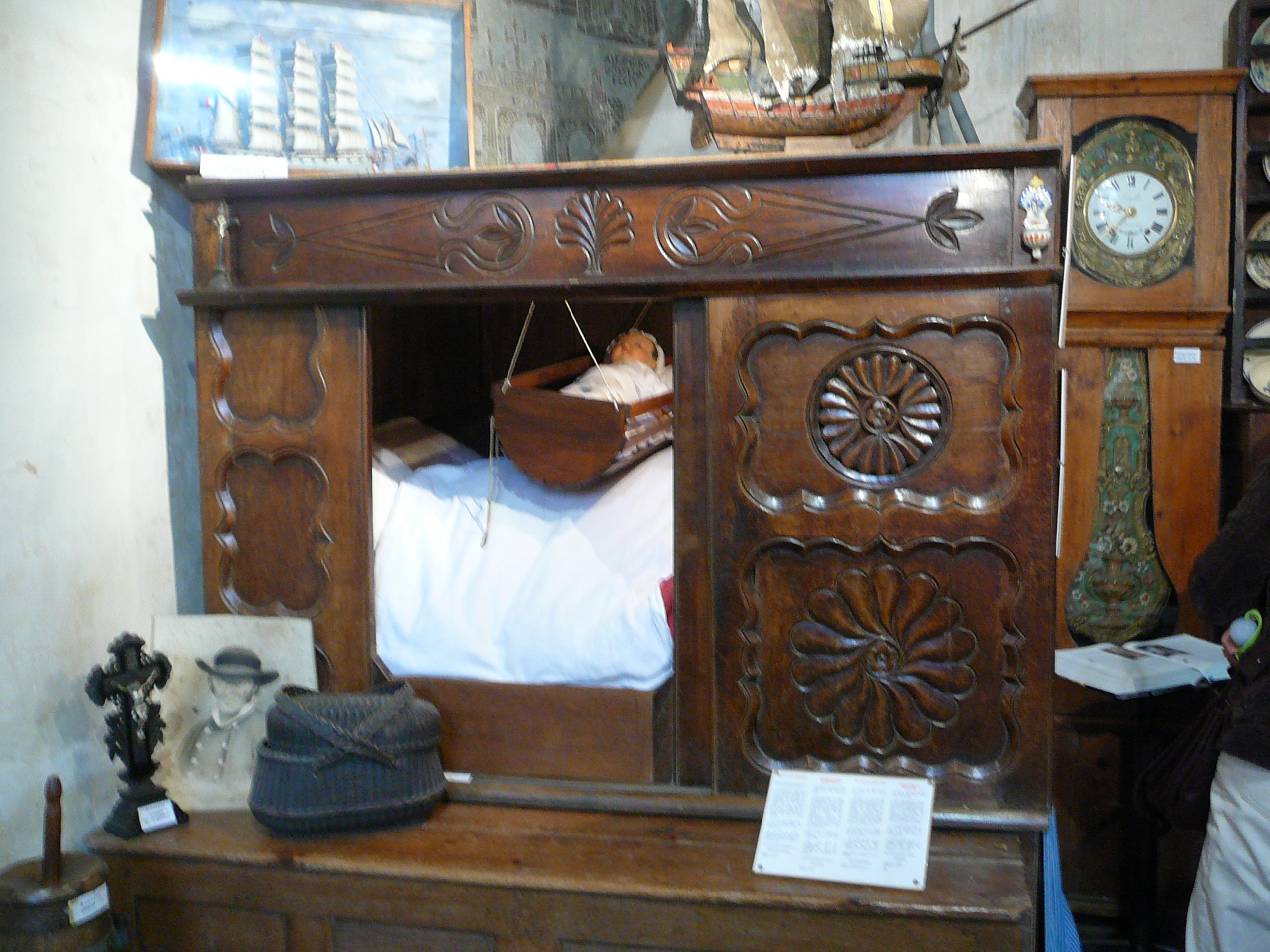 Sizun : lit clos dans le musée de l'ossuaire